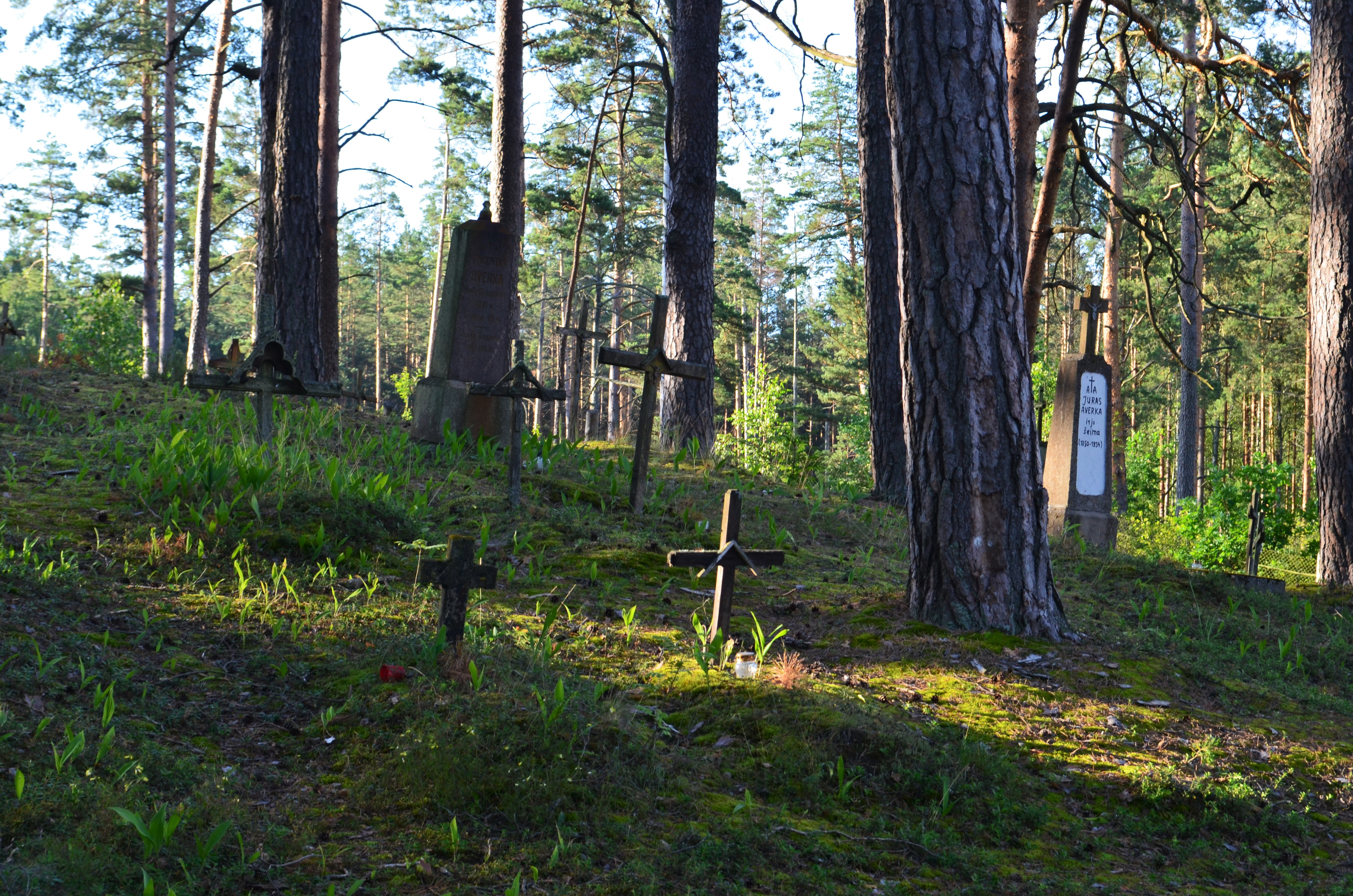 Musteikos k. kapeliai, Varėnos r.